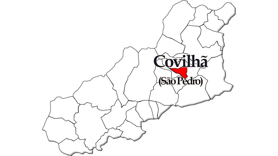 População